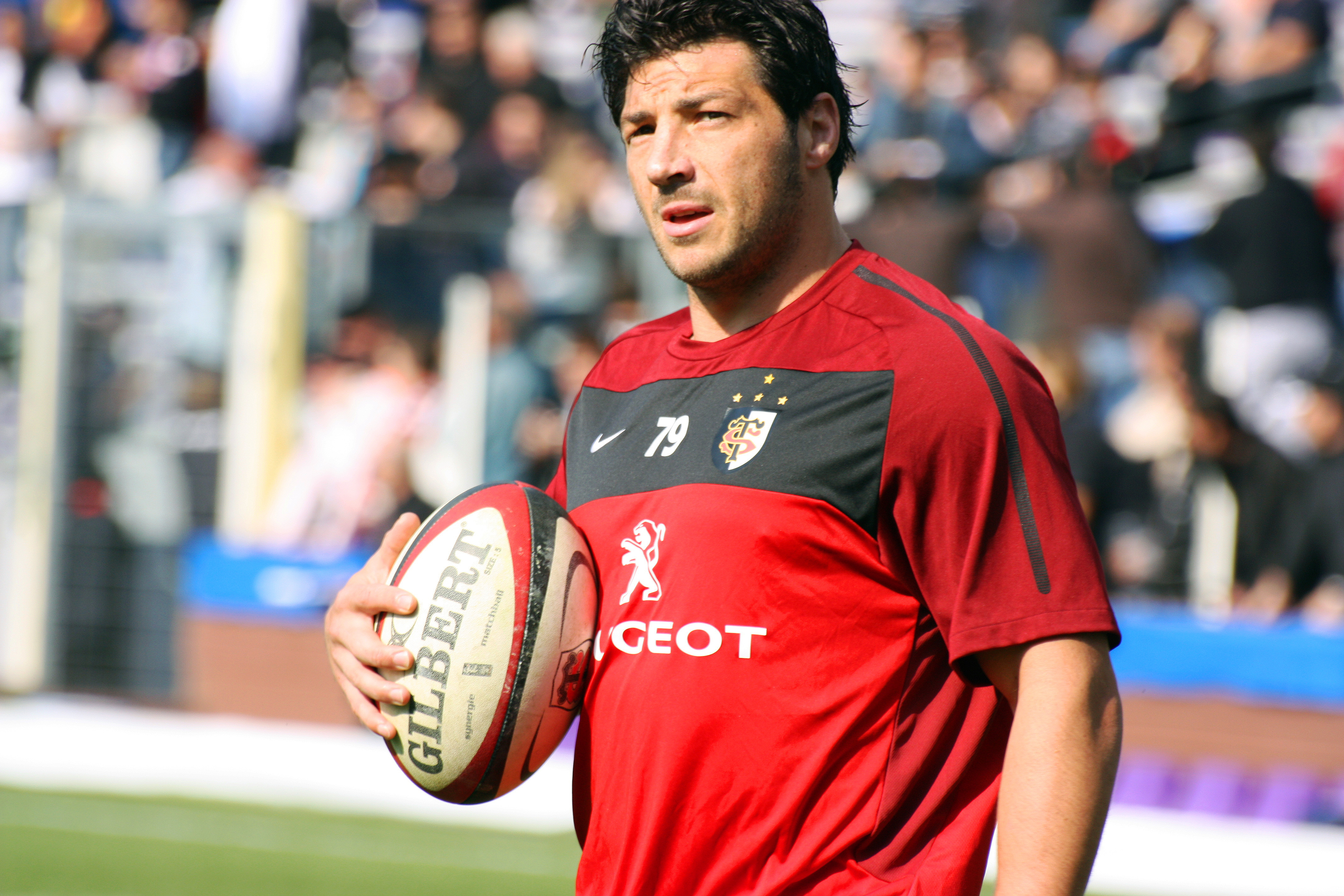 Byron Kelleher à l'entrainement d'avant-match face à l'USA Perpignan